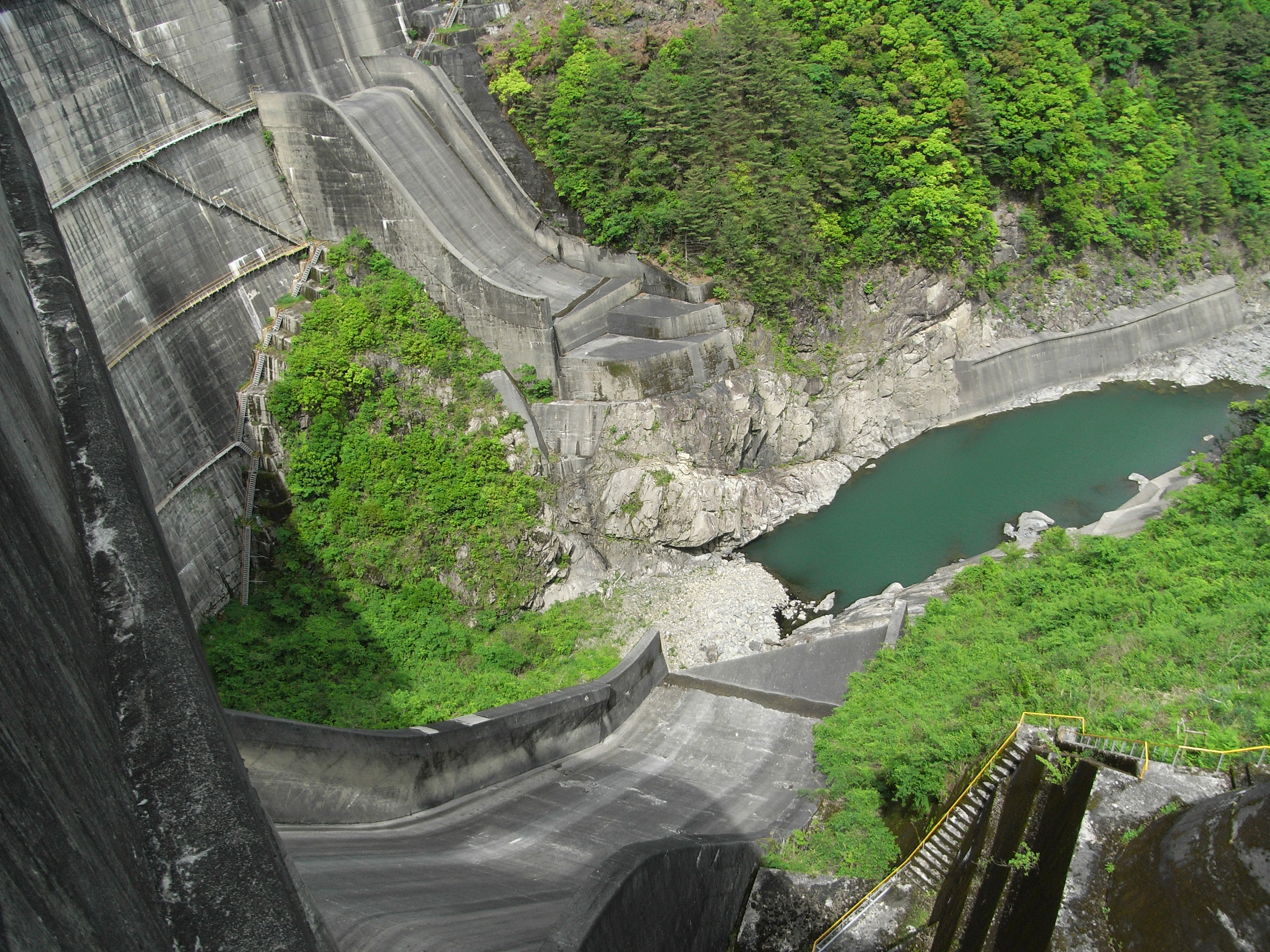 Dam